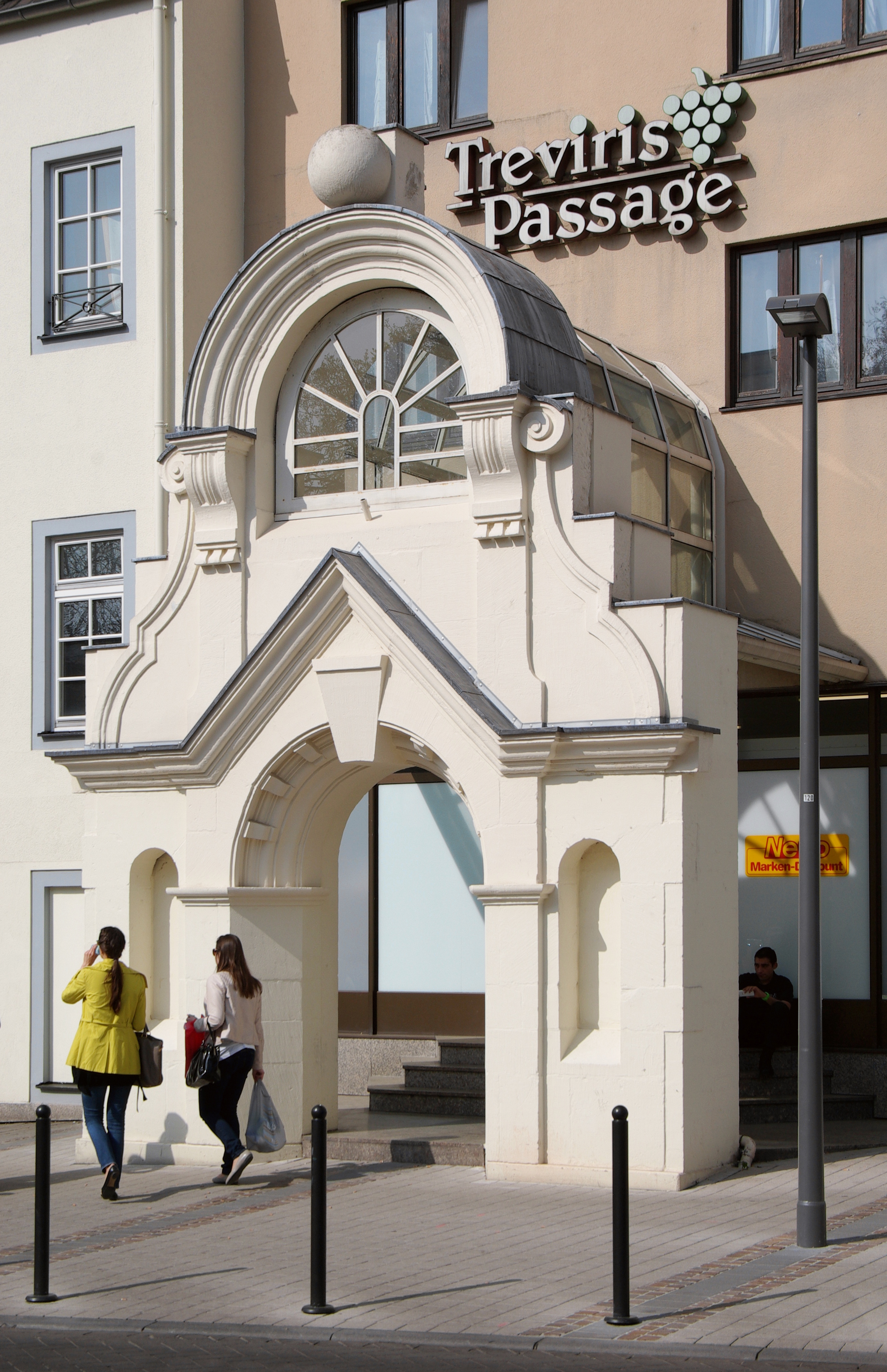 Trier, Jakobstraße, Treviris Passage, Portal der alten Treviris, um 1900